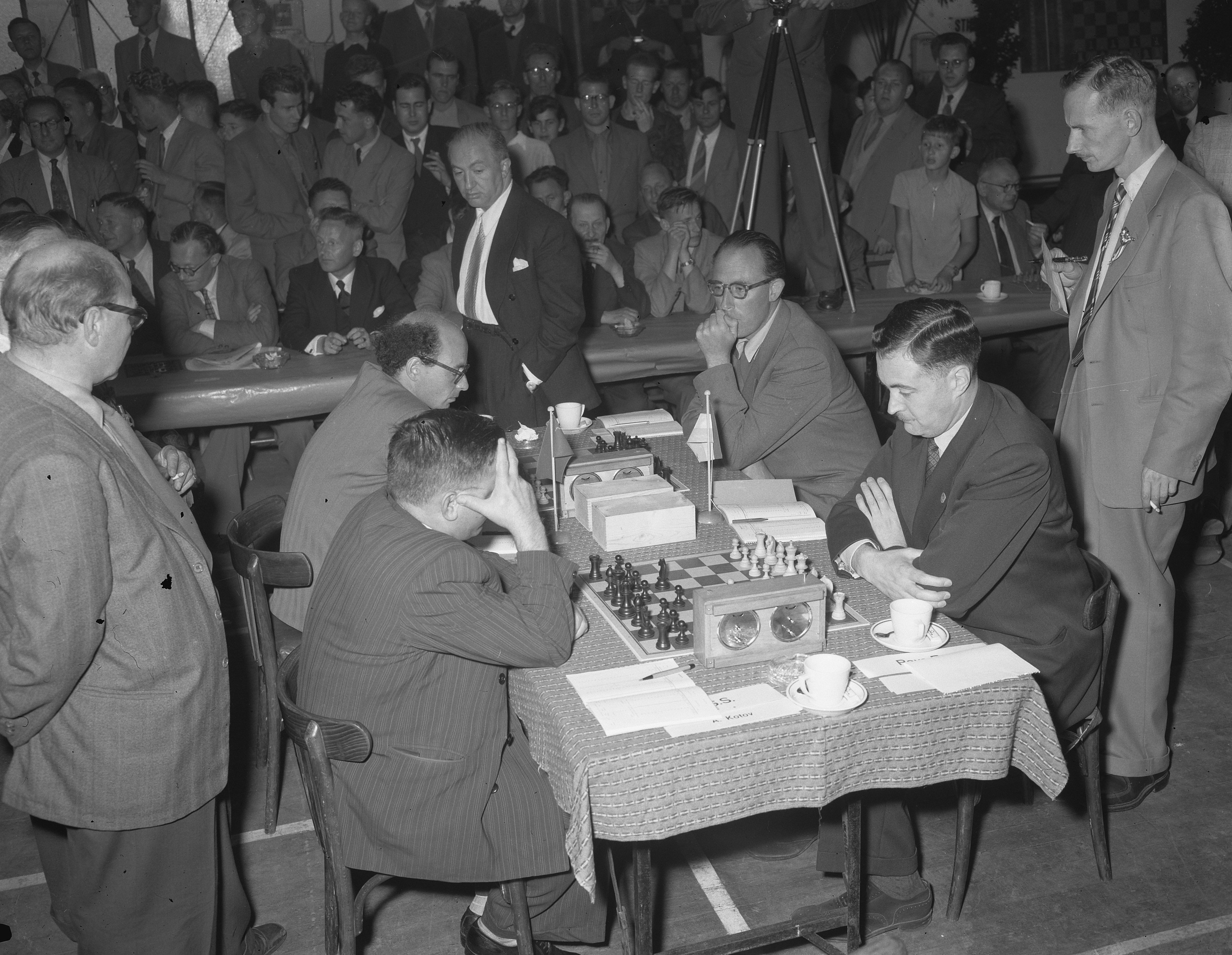 Collectie / Archief : Fotocollectie Anefo Reportage / Serie : [ onbekend ] Beschrijving : Schaaktoernooi partijen Rusland tegen Nederland Amsterdam Datum : 9 september 1954 Locatie : Amsterdam, Noord-Holland Trefwoorden : PARTIJEN, SCHAAKTOURNOOIen Fotograaf : Noske, J.D. / Anefo Auteursrechthebbende : Nationaal Archief Materiaalsoort : Negatief (zwart/wit) Nummer archiefinventaris : bekijk toegang 2.24.01.04 Bestanddeelnummer : 906-7100